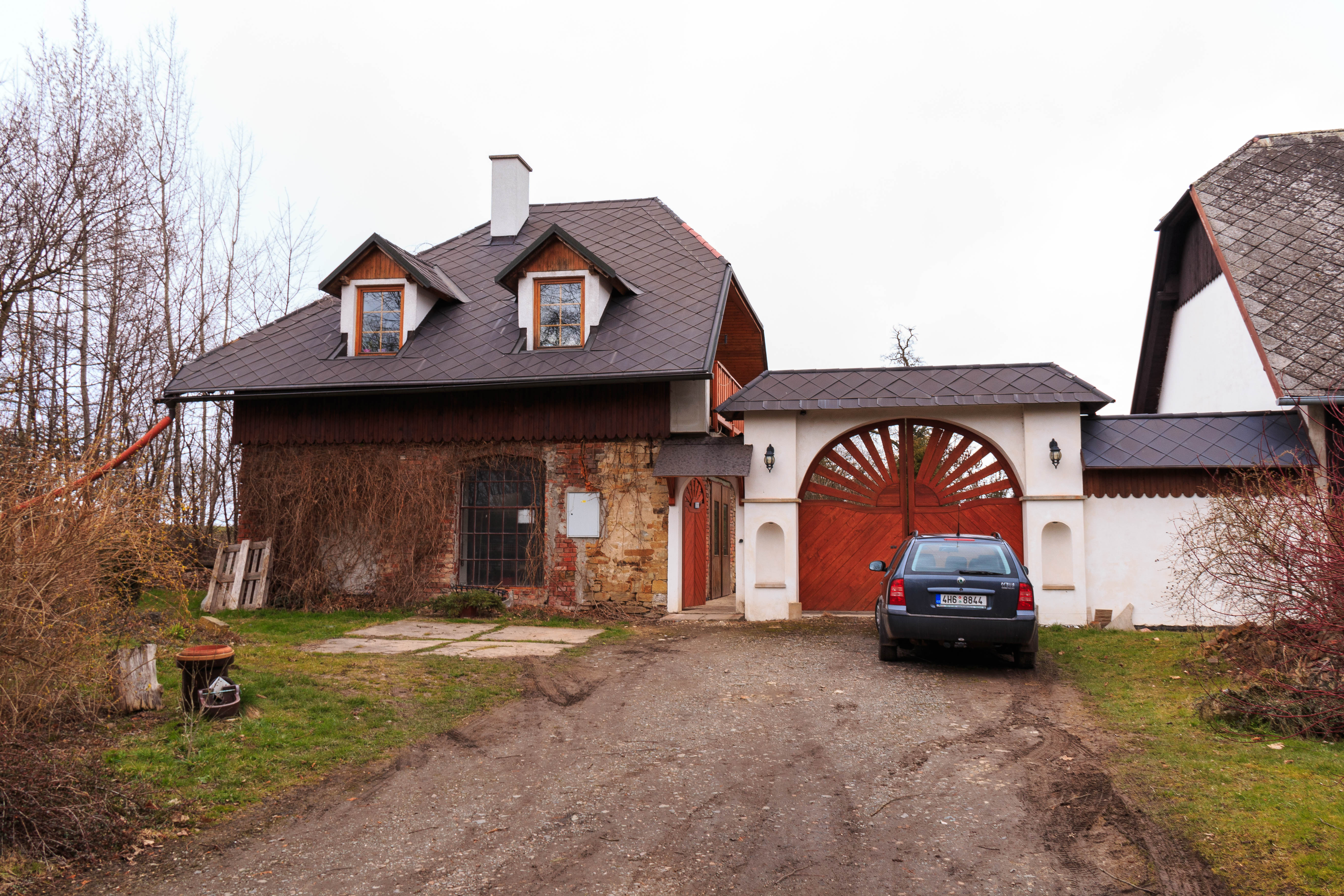 Hostinka čp. 7